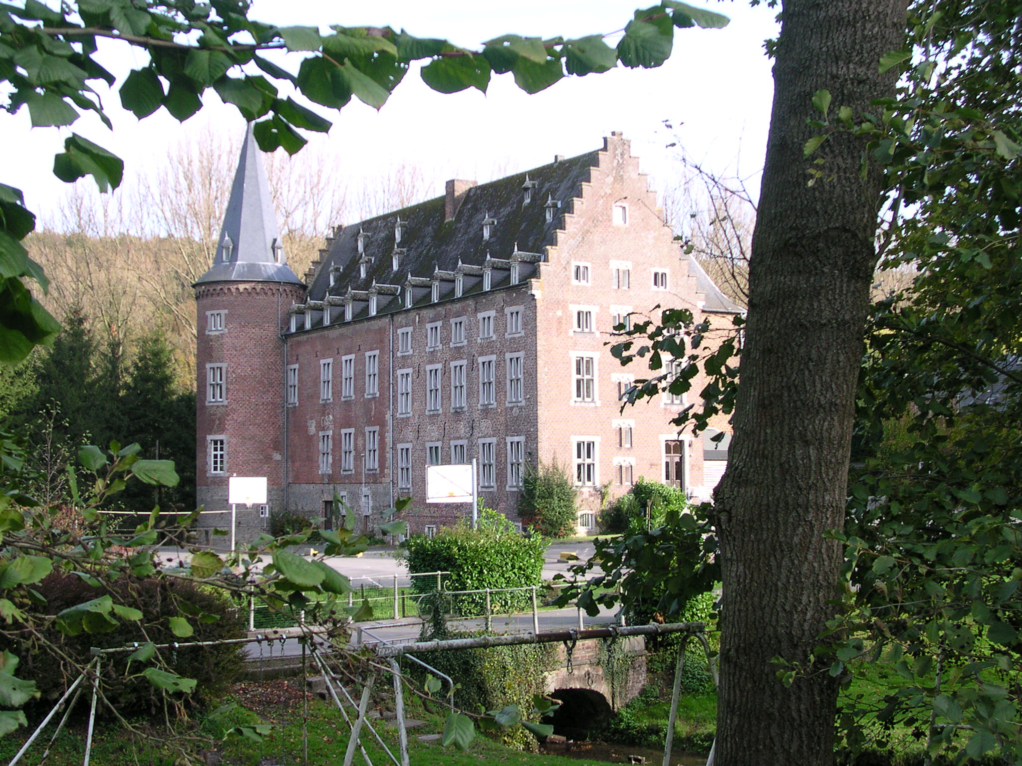 Burg “Notre Dame” zwischen Hombourg und Teuven